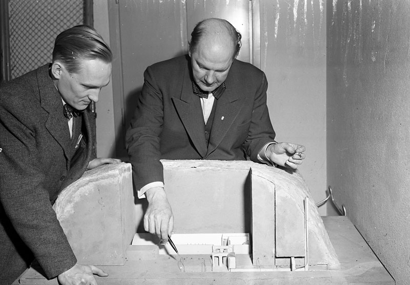 Kungsholmsgatan 30, Civilförsvarsbyrån. Ingenjörerna Edmén och Hollander studerar en modell av ett nytt bergskyddsrum.